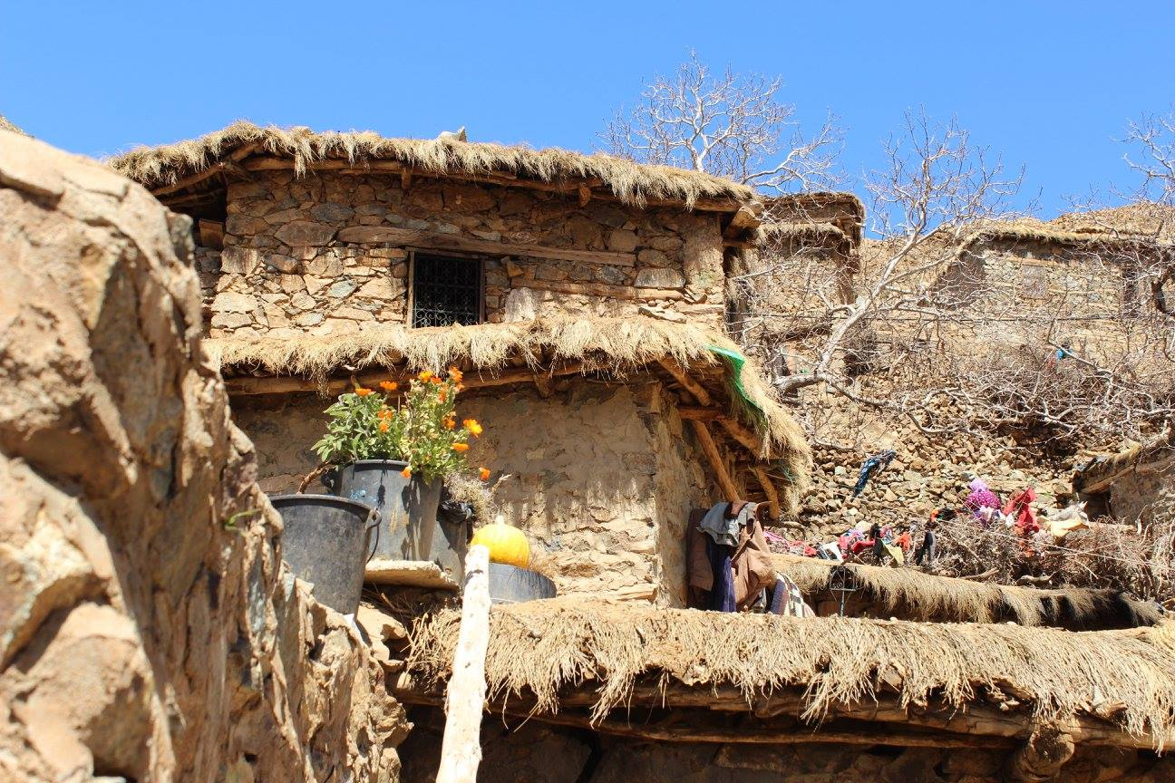 أحد منازل تغزيرت، يتميز ببناء تقليدي بواسطة صخور الغرانيت المنتشرة في المنطقة